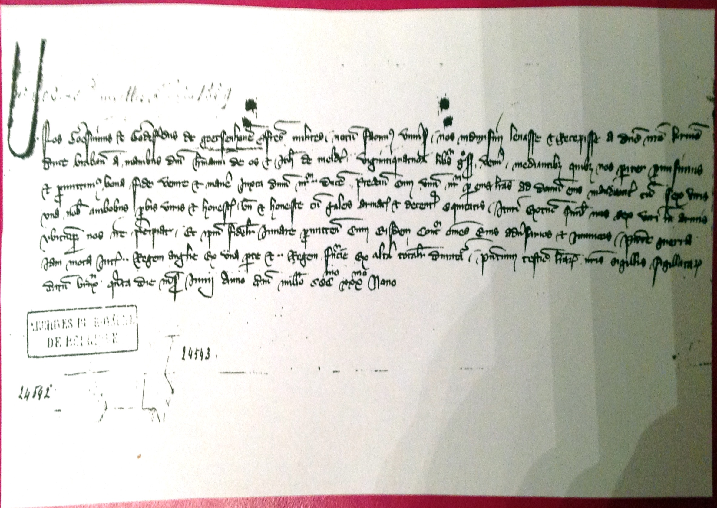 Charte historique provenant du duché de Brabant, présente aux archives de Belgique, dans laquelle il est indiqué que les frères Goswin et Godefroid van Goetsenhoven sont chevaliers.